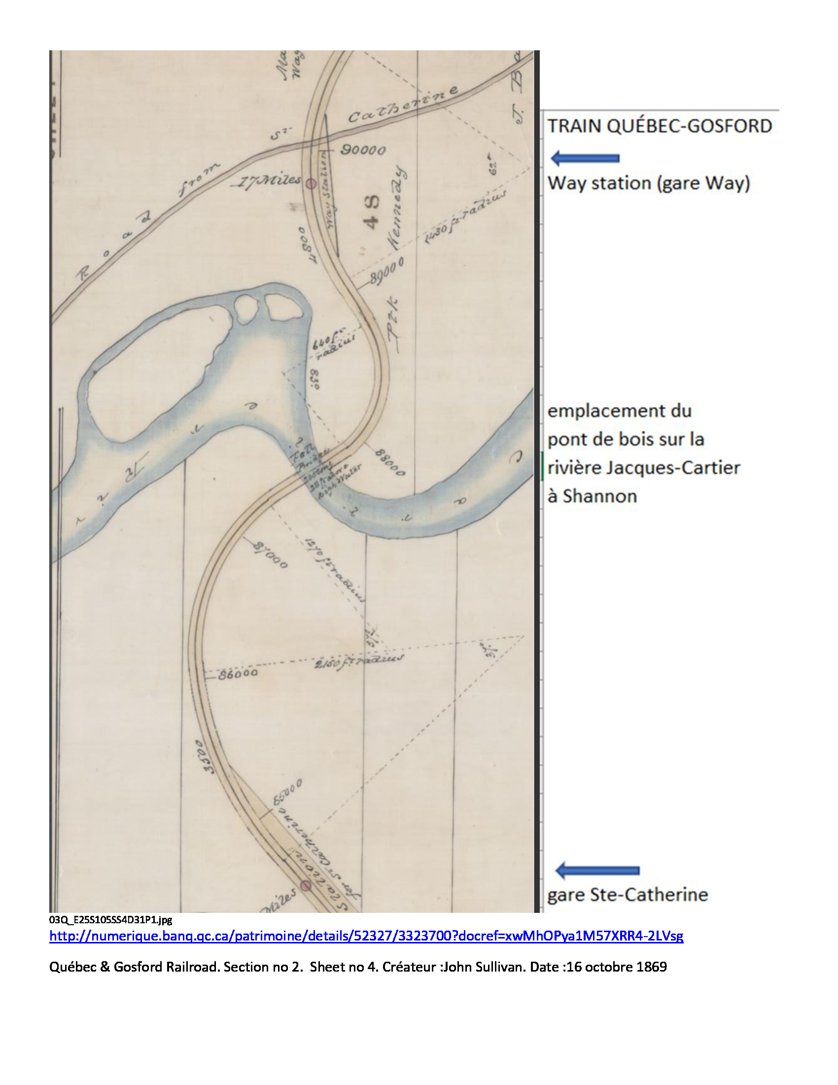 Carte du tracé original avec emplacement du pont de bois sur la rivière Jacques-Cartier, des 3 courbes prononcées et de 2 gares (Ste-Catherine et Way).